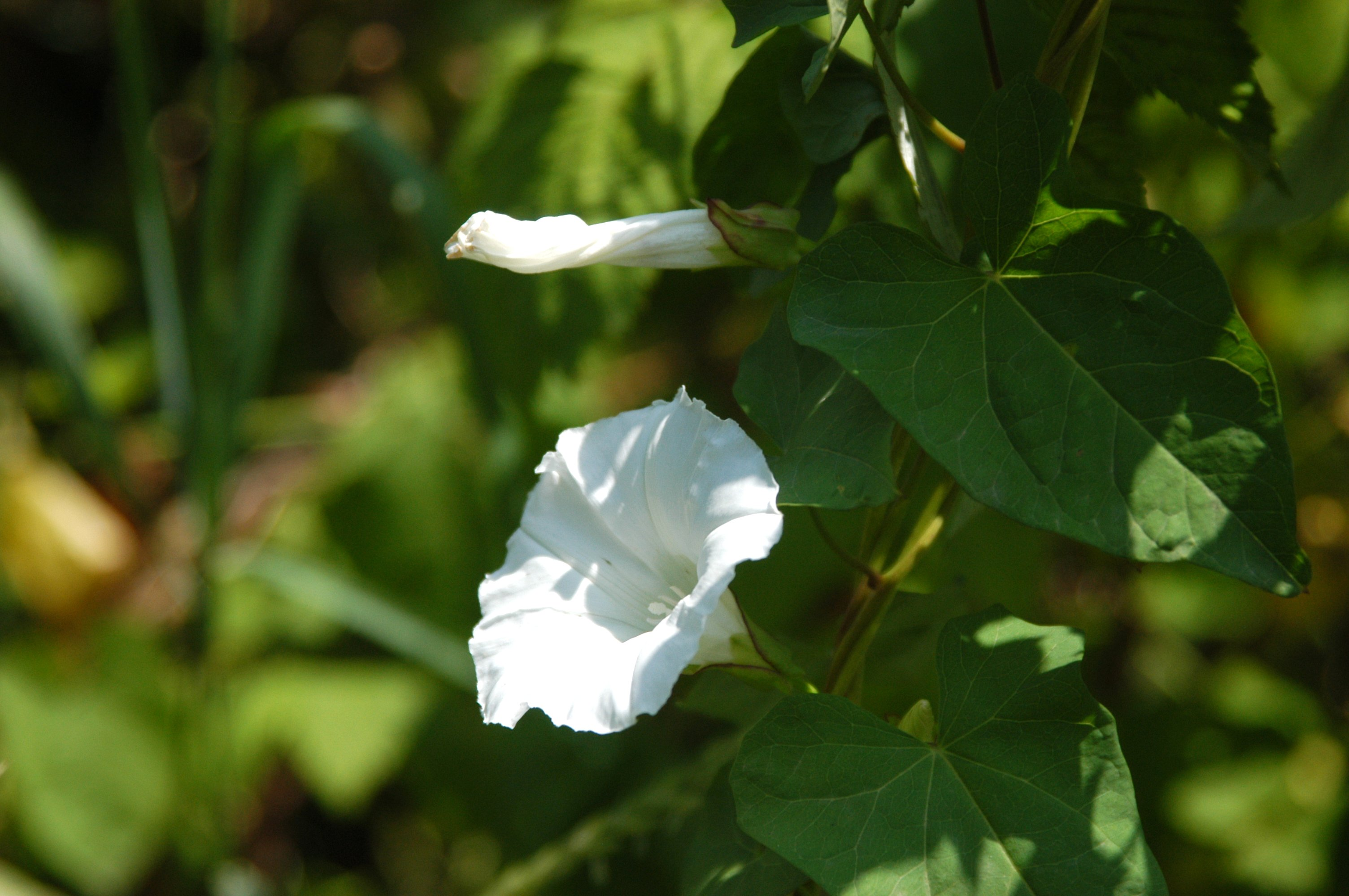 Echte Zaunwinde (Calystegia sepium) an Himbeere